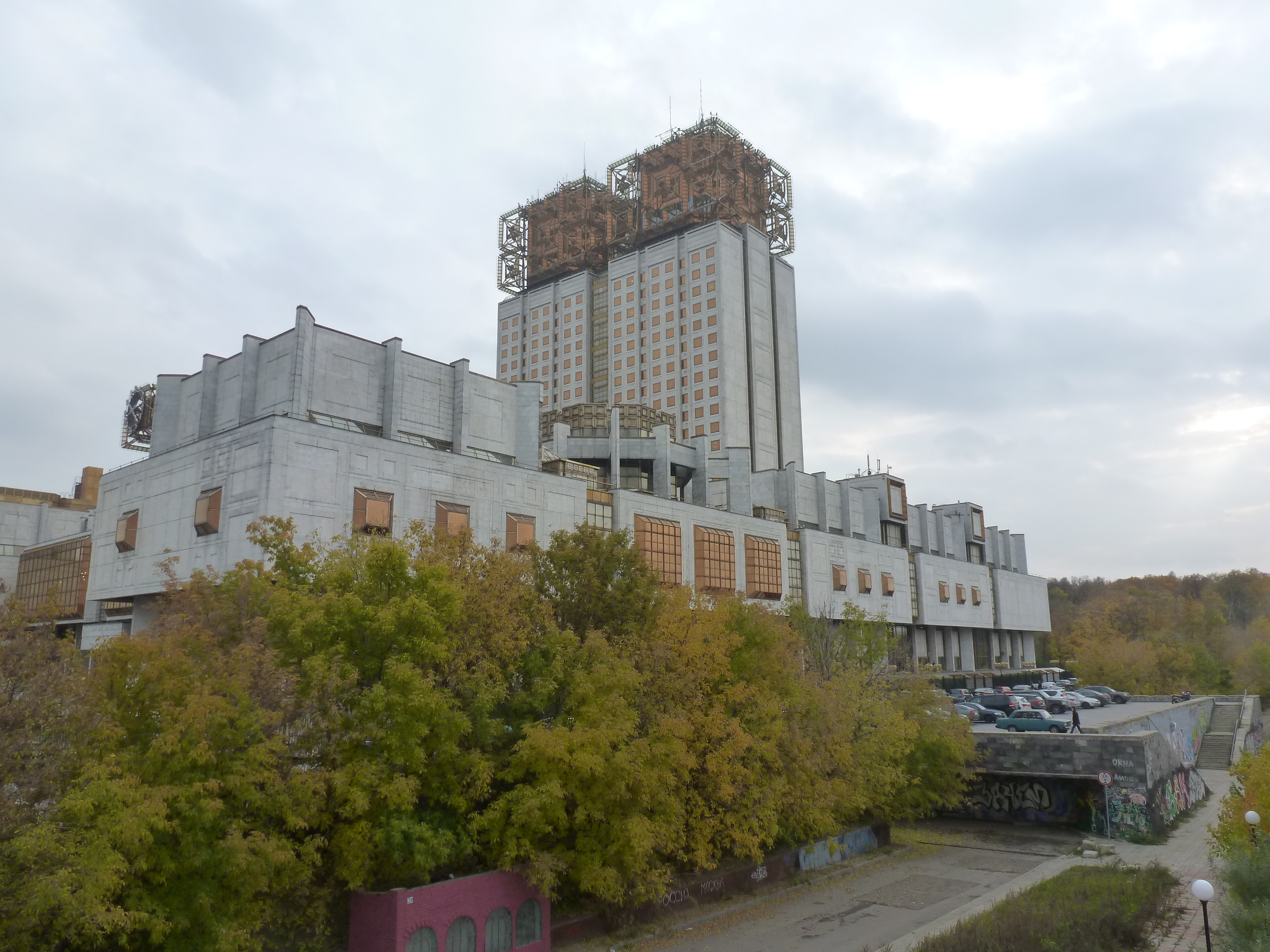 Akademio de Sciencoj, Moskvo